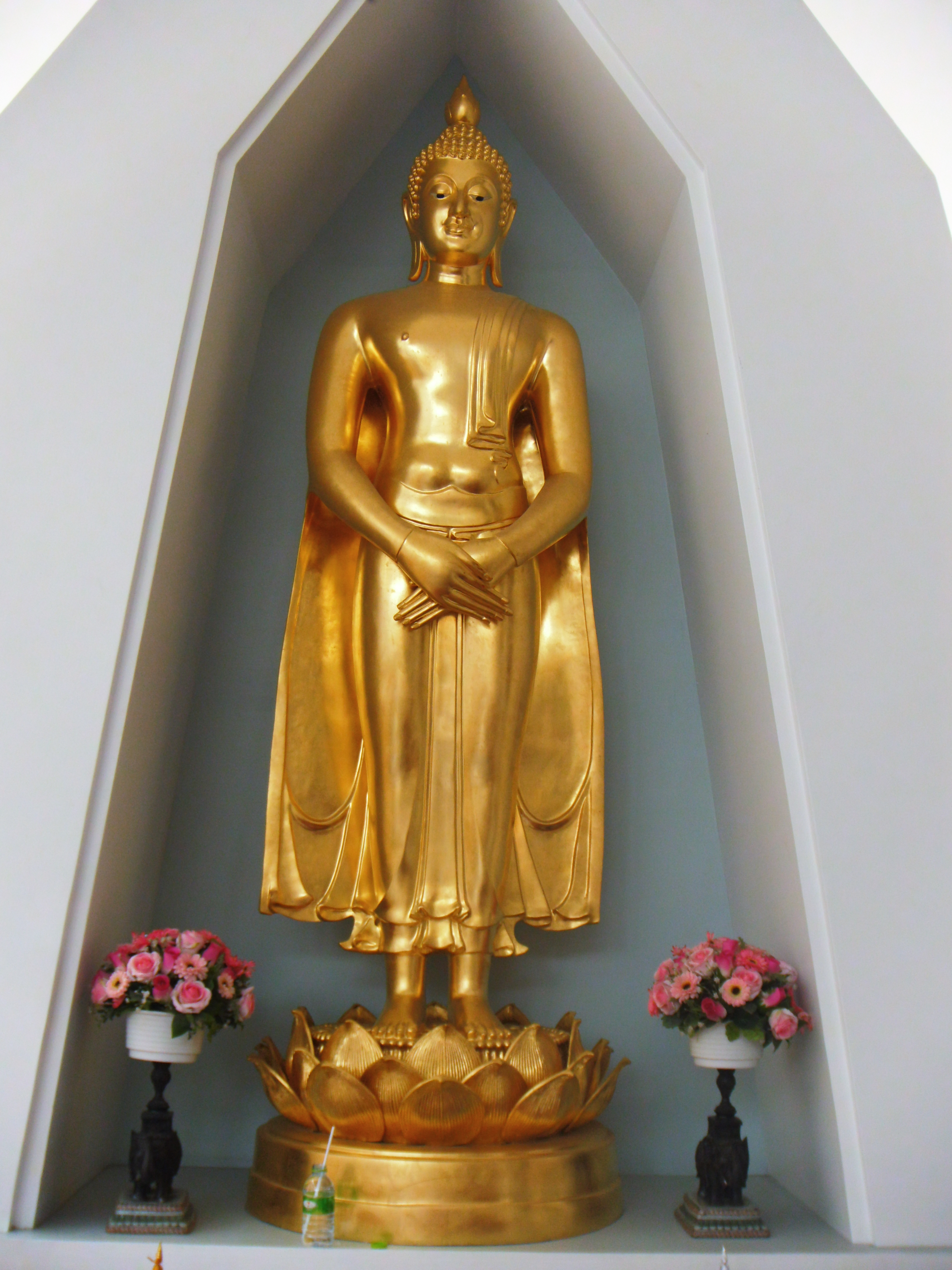 วัดนาคปรก